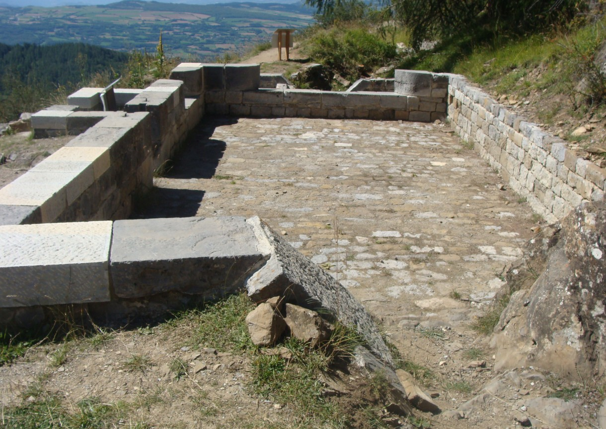 Canal de Mal-Cros : le répartiteur de Chaillol, vue d'ensemble depuis le côté entrant.